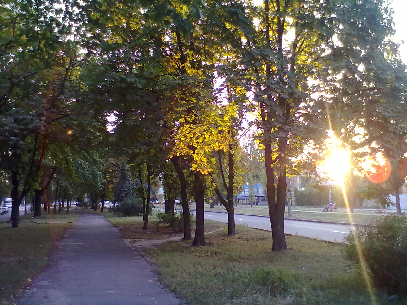 аллея на бульв. Ивана Лепсе, Киев